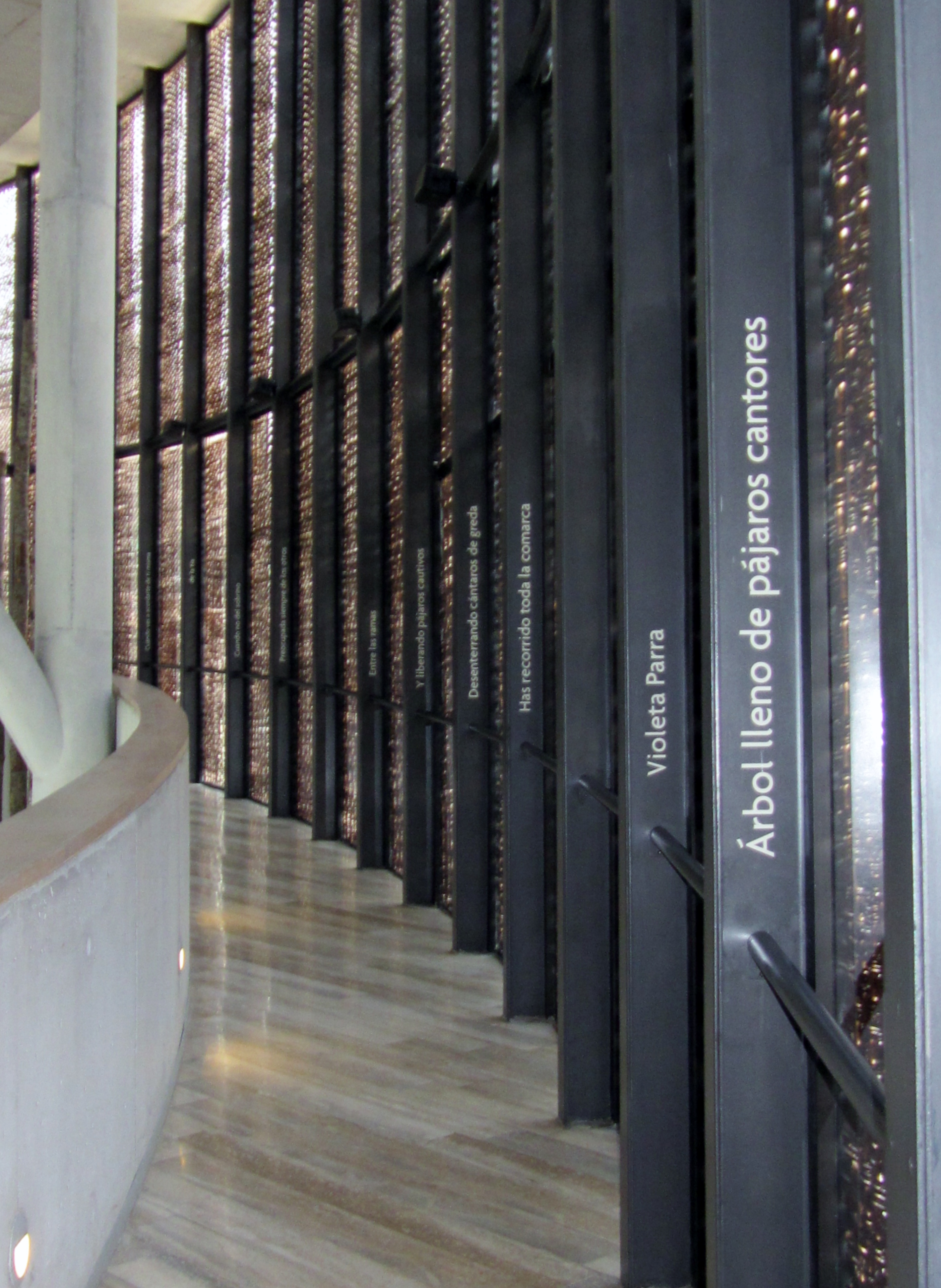 Rampa de inicio de la exhibición del Museo Violeta Parra con el poema de su hermano Nicanor Defensa de Violeta; Santiago de Chile.